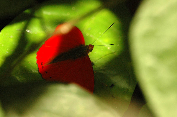 Uganda Kanyo Pabidi Res, Masindi, Uganda